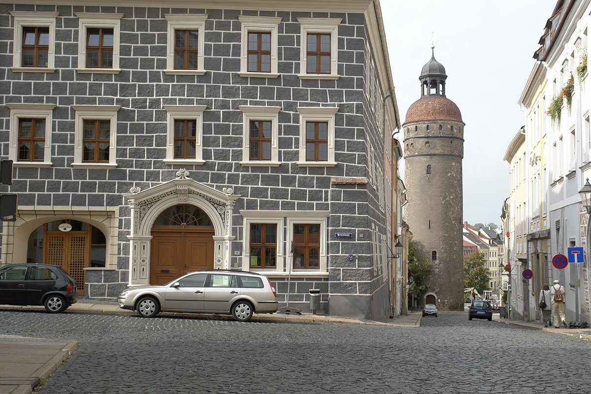 Nikolaiturm in Görlitz